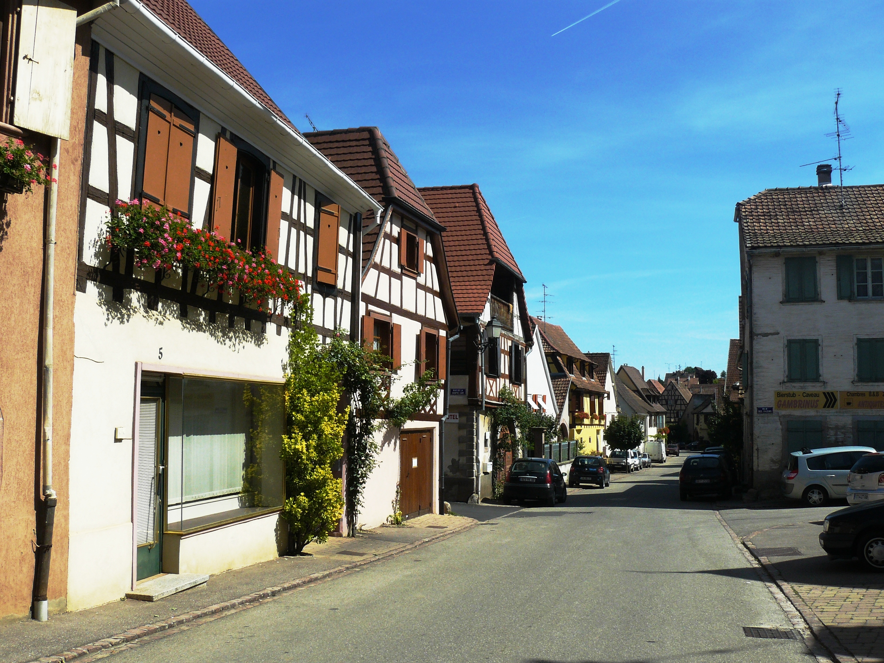 Maisons à colombages, rue Jean Macé